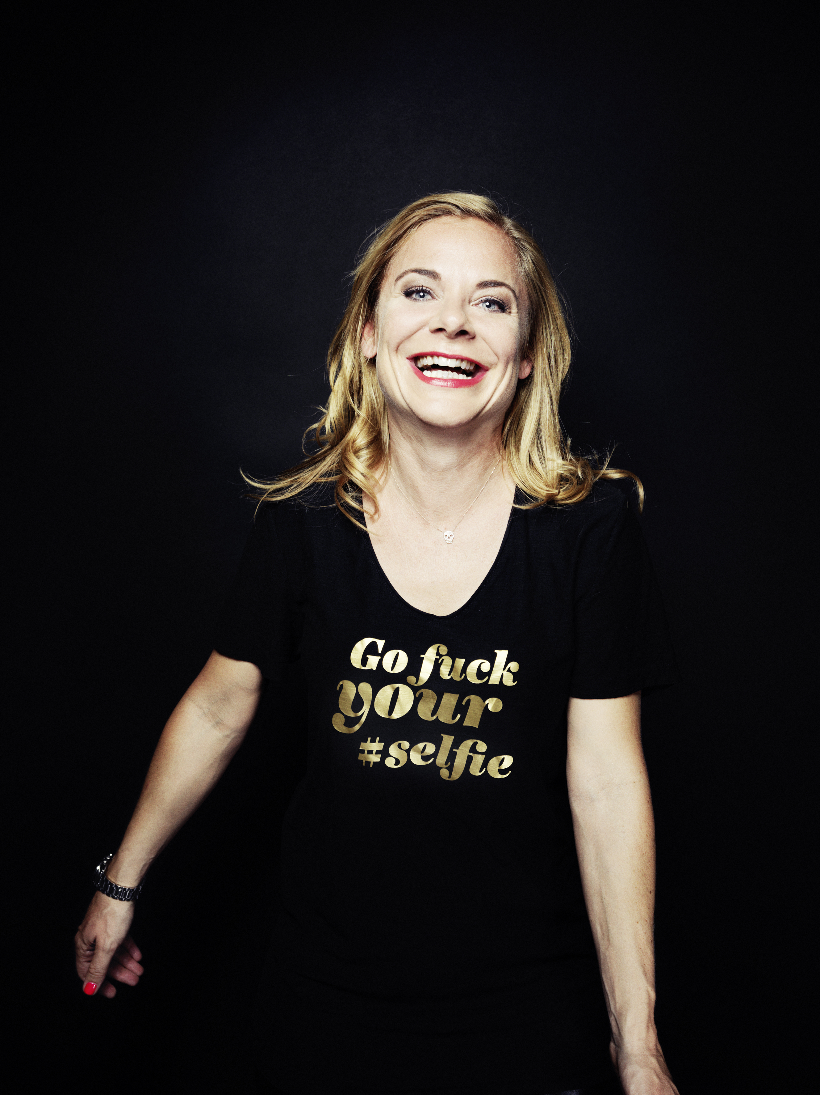 Portrait der Autorin Anitra Eggler